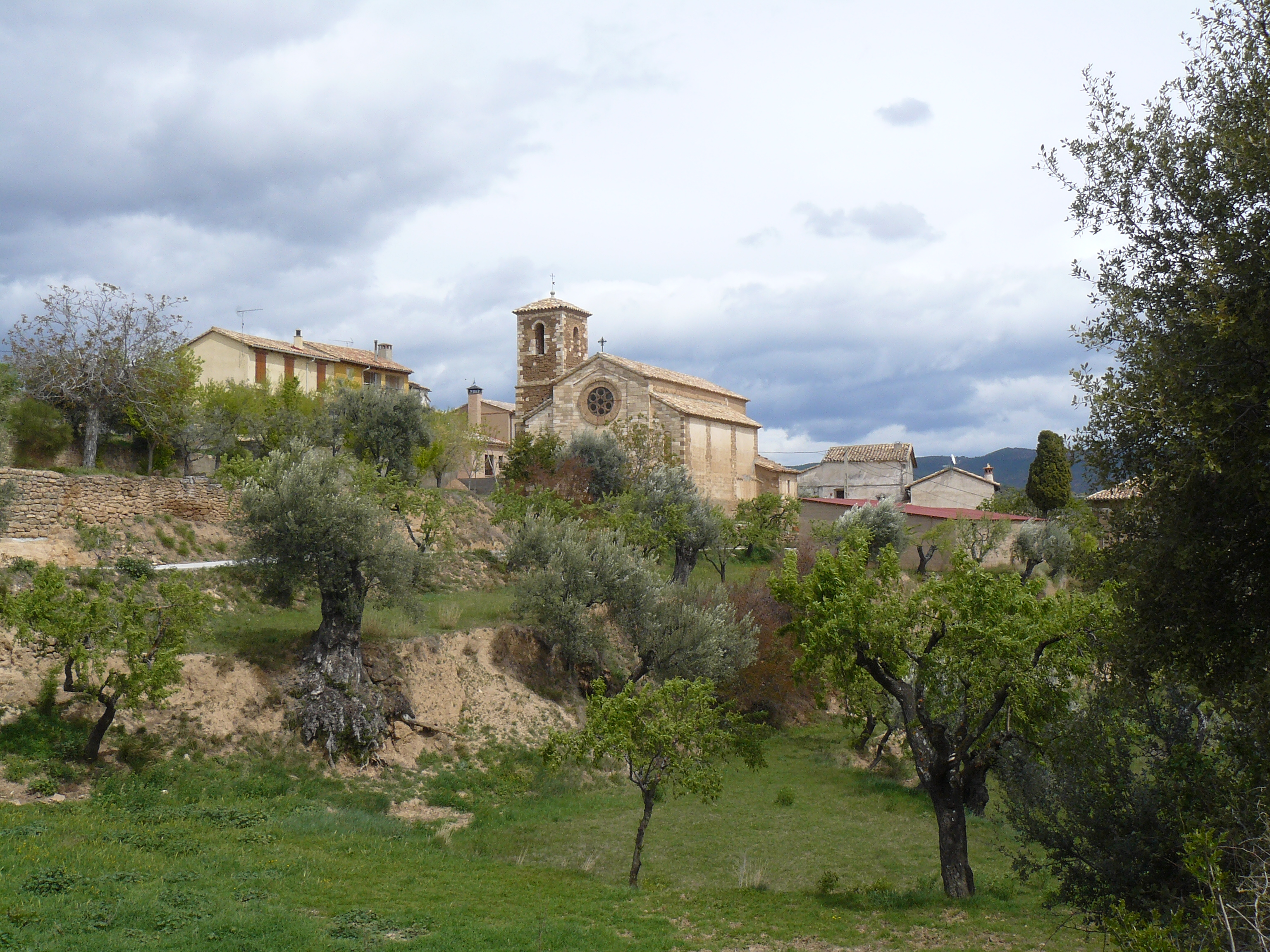 Asque, Huesca.